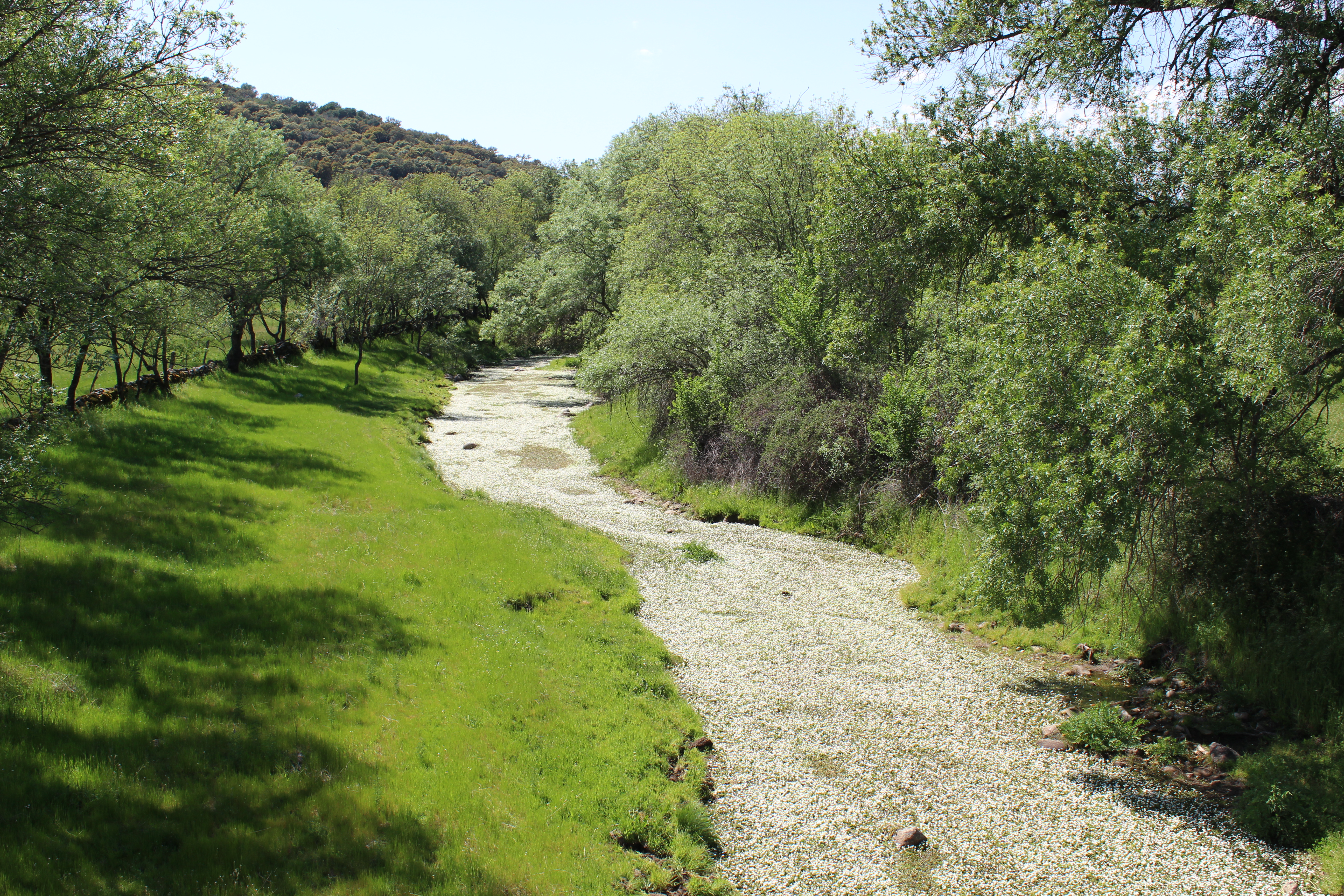 Vista de la Garganta Torinas, provincia de Toledo.